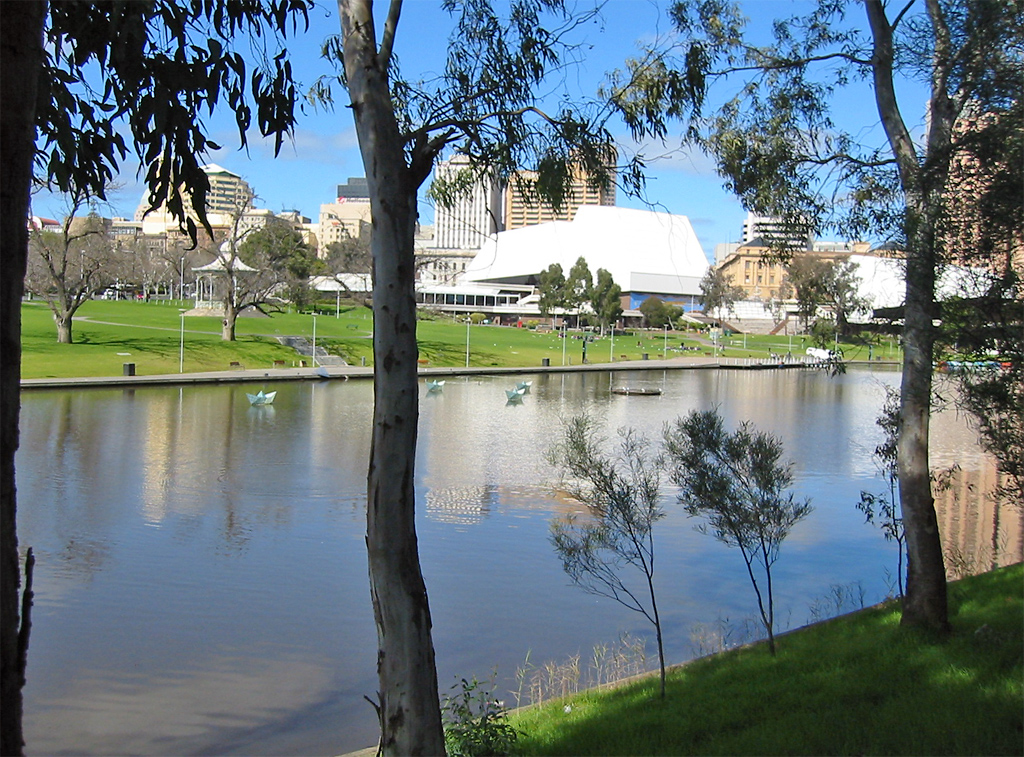 Adelaide, Parkring mit Blick über River Torrens nach Süden Richtung Stadtzentrum